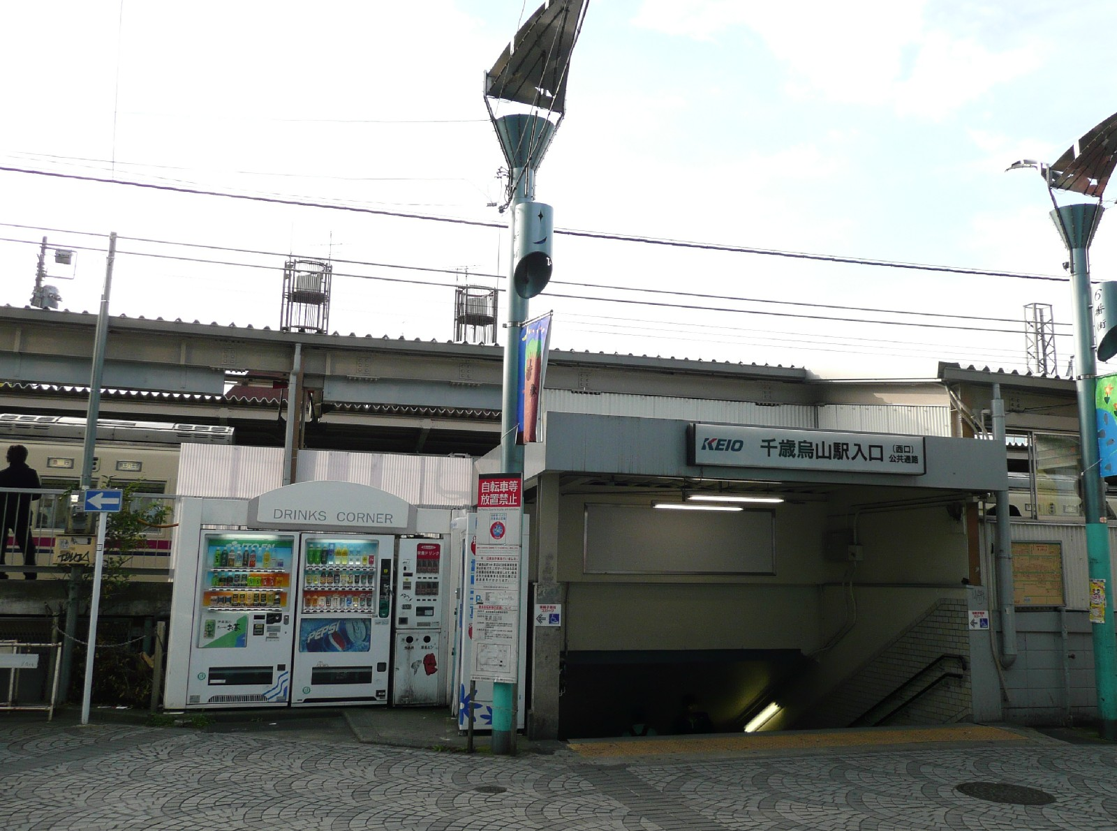 千歳烏山駅西口